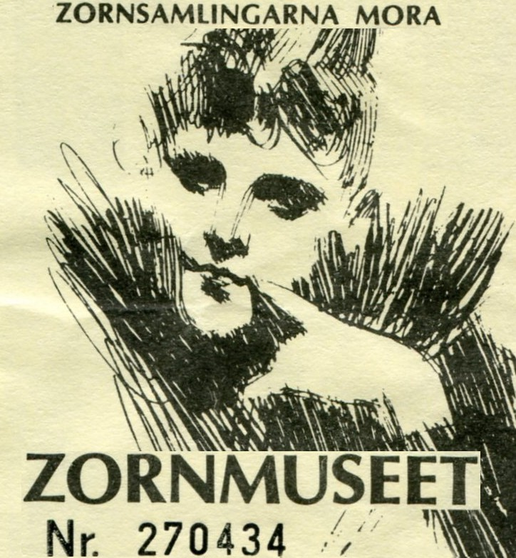 Entrébiljett till Zornmuseet med ett motiv av Anders Zorn